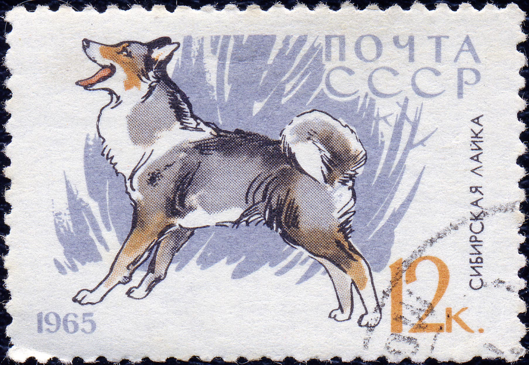 Почтовая марка СССР. 1965. Сибирская лайка